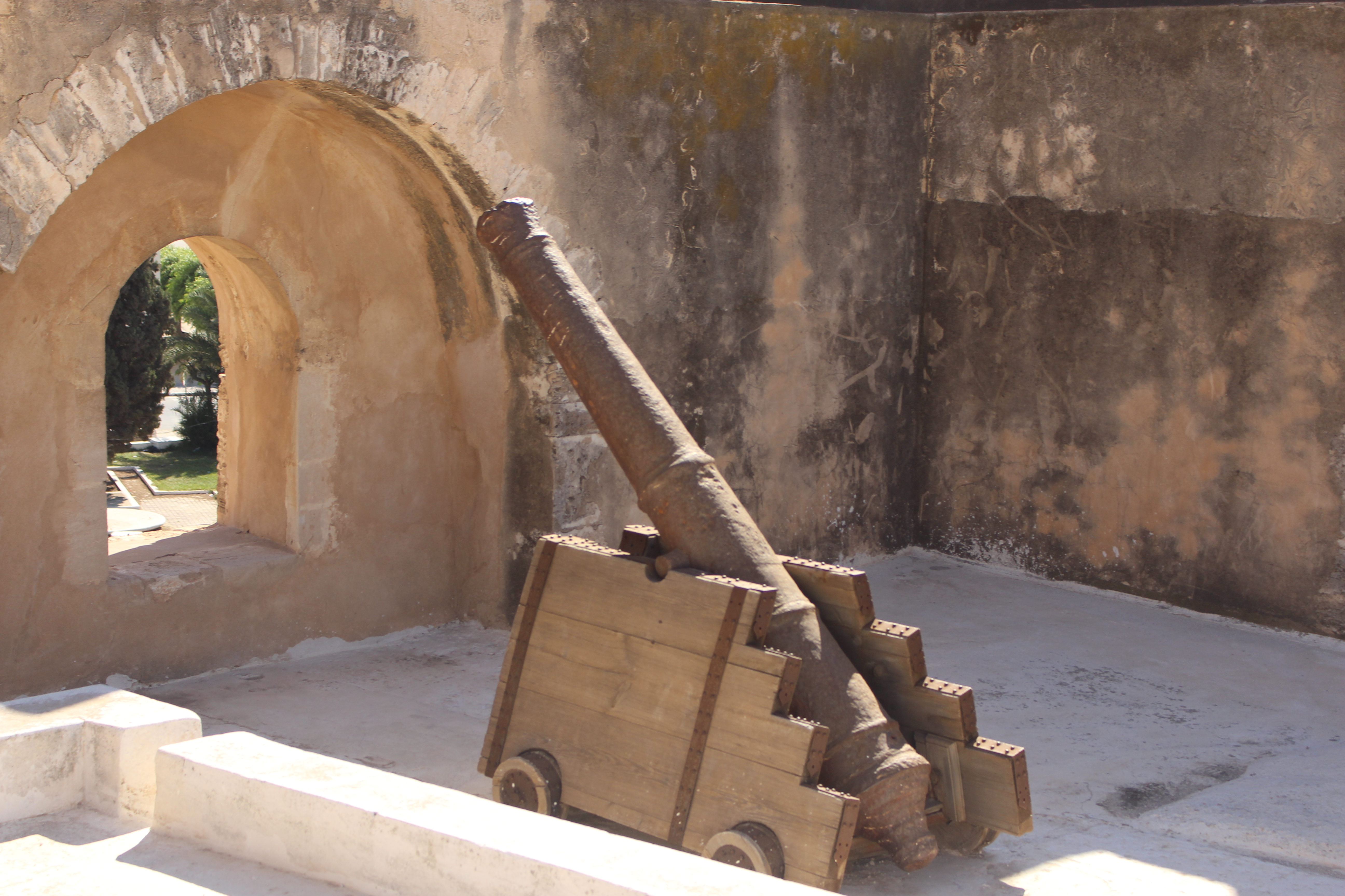 Ceci est un canon de guerre utilisé dans la Casbah de Sfax pour défendre la Médina de Sfax il y a quelques siècles.